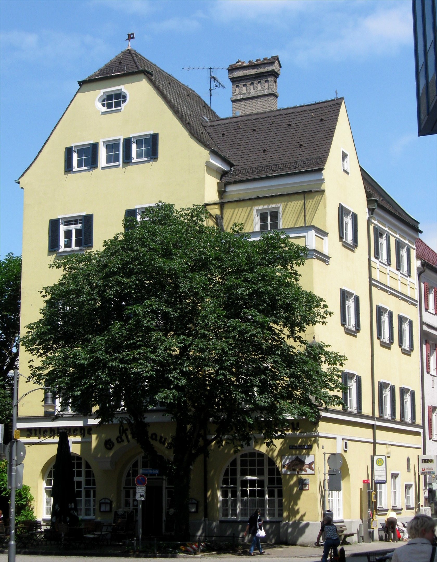 Gillitzerstraße 10; Wohn- und Gasthaus, stattliches viergeschossiges Eckhaus, in reduziert-historisierenden Formen mit Flacherker und aufgegliederter Dachzone, 1905/06 nach Plänen von Franz Xaver Knöpfle; zugehörig erdgeschossiges ehem. Gartenhaus, nach 1906, westlich im eingefriedeten Wirtsgarten.